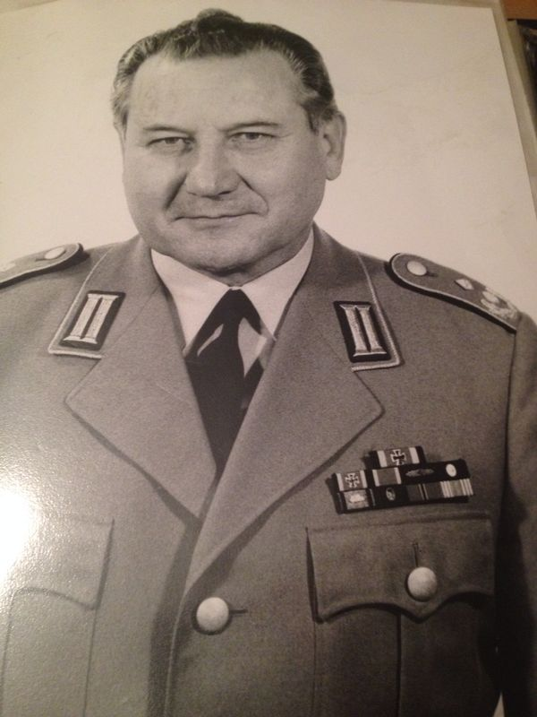 Johann Lutz als Oberstleutnant in Bundeswehruniform